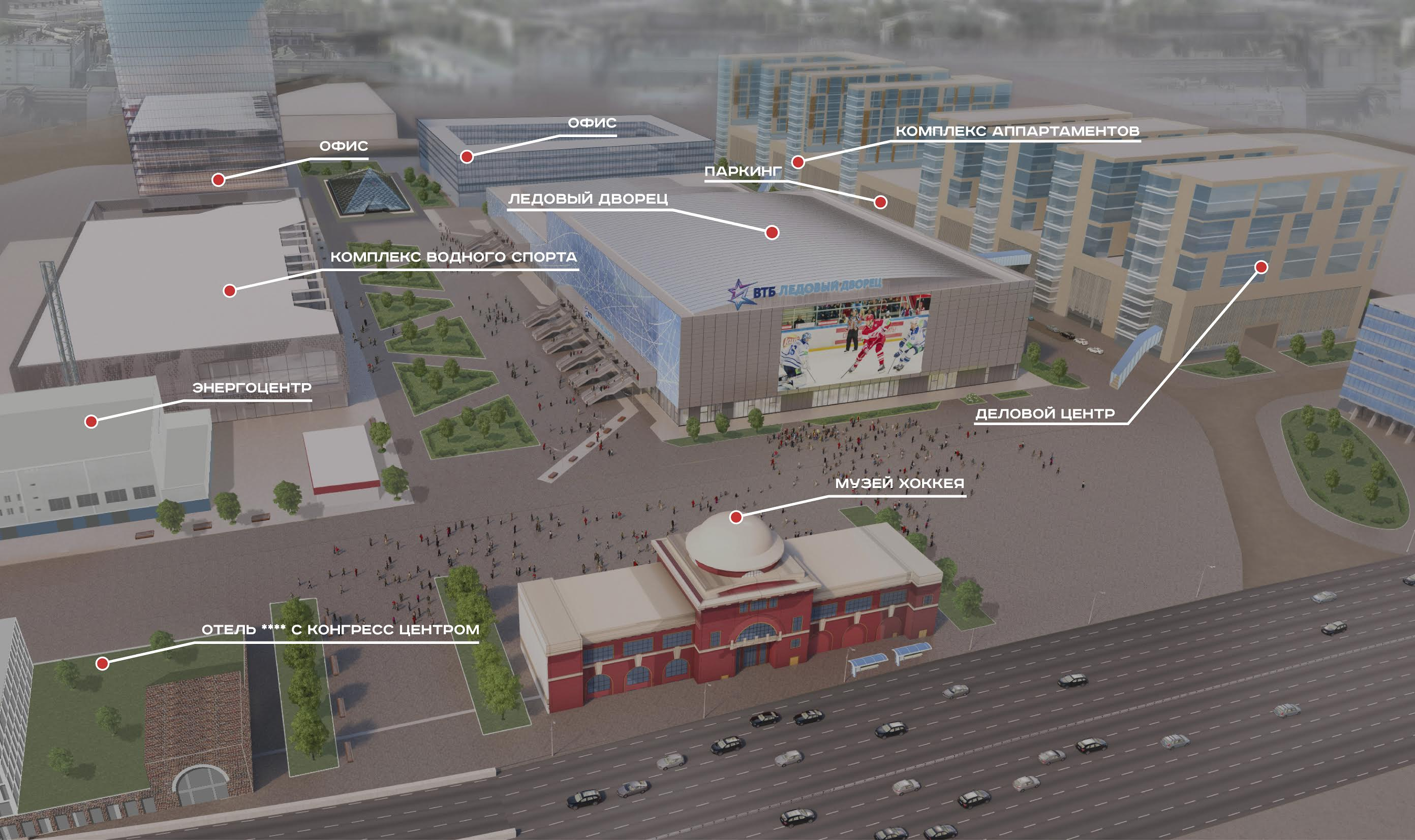 схема спортивно-развлекательного квартала «Парк Легенд»